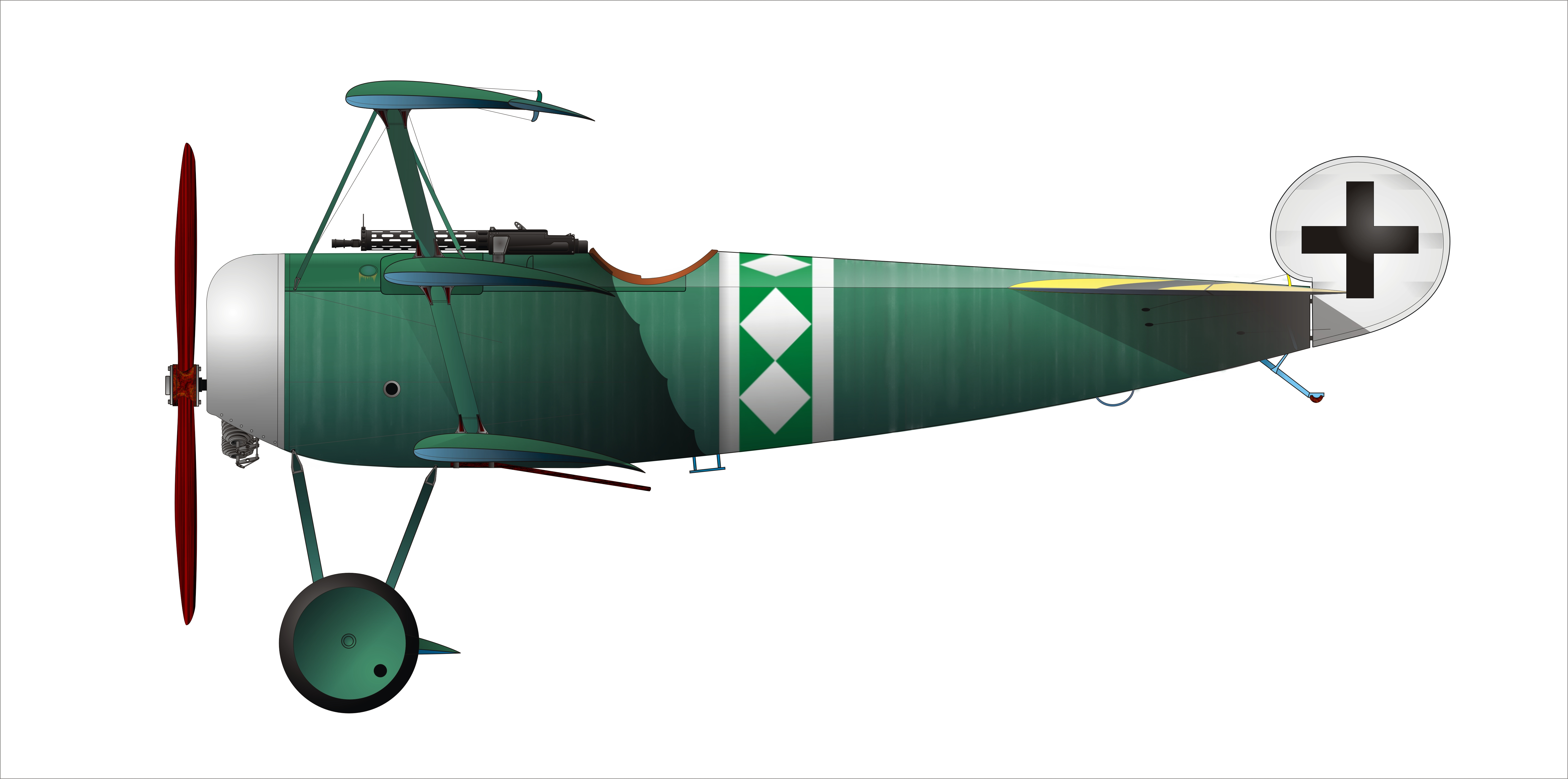 Fokker DR. I, Leutnant Pippart, Jasta 19